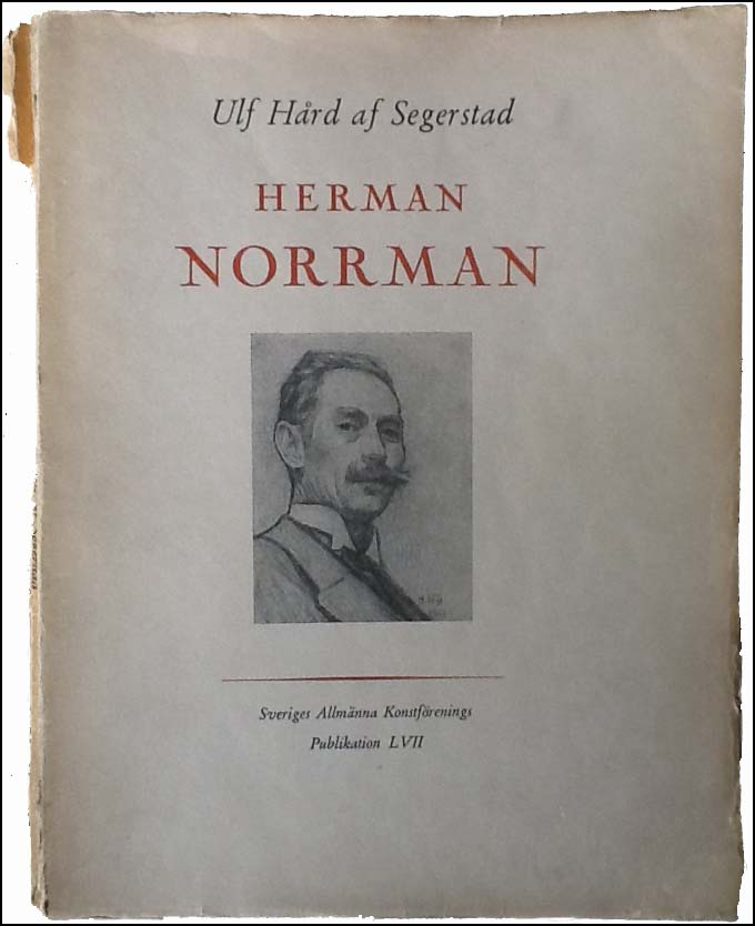 Herman Norrman, bok av Ulf Hård af Segerstad. Utgiven 1948